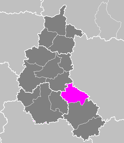 Maps of arrondissements and cantons of France: Arrondissement de Saint-Dizier.PNG